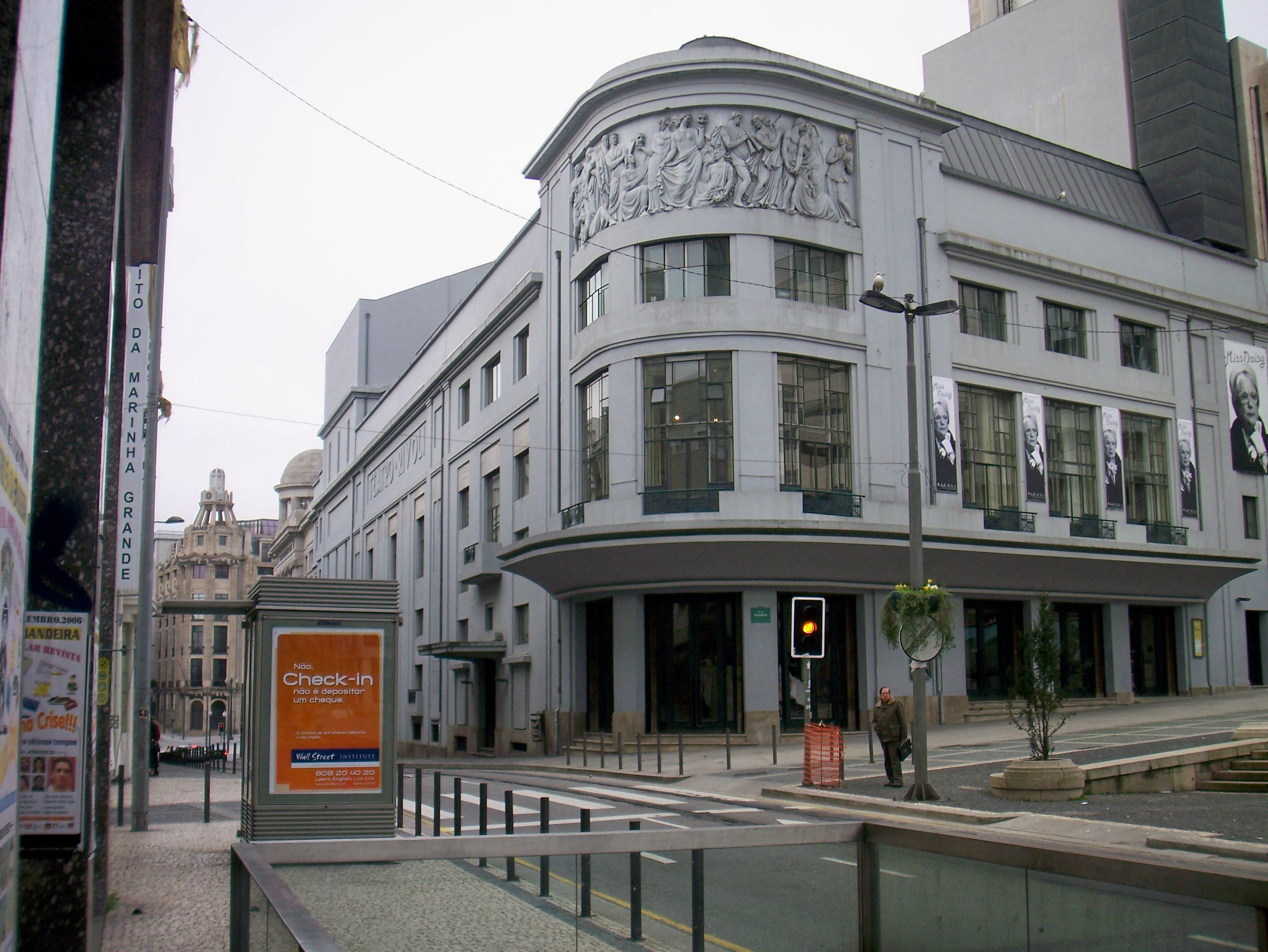 Porto